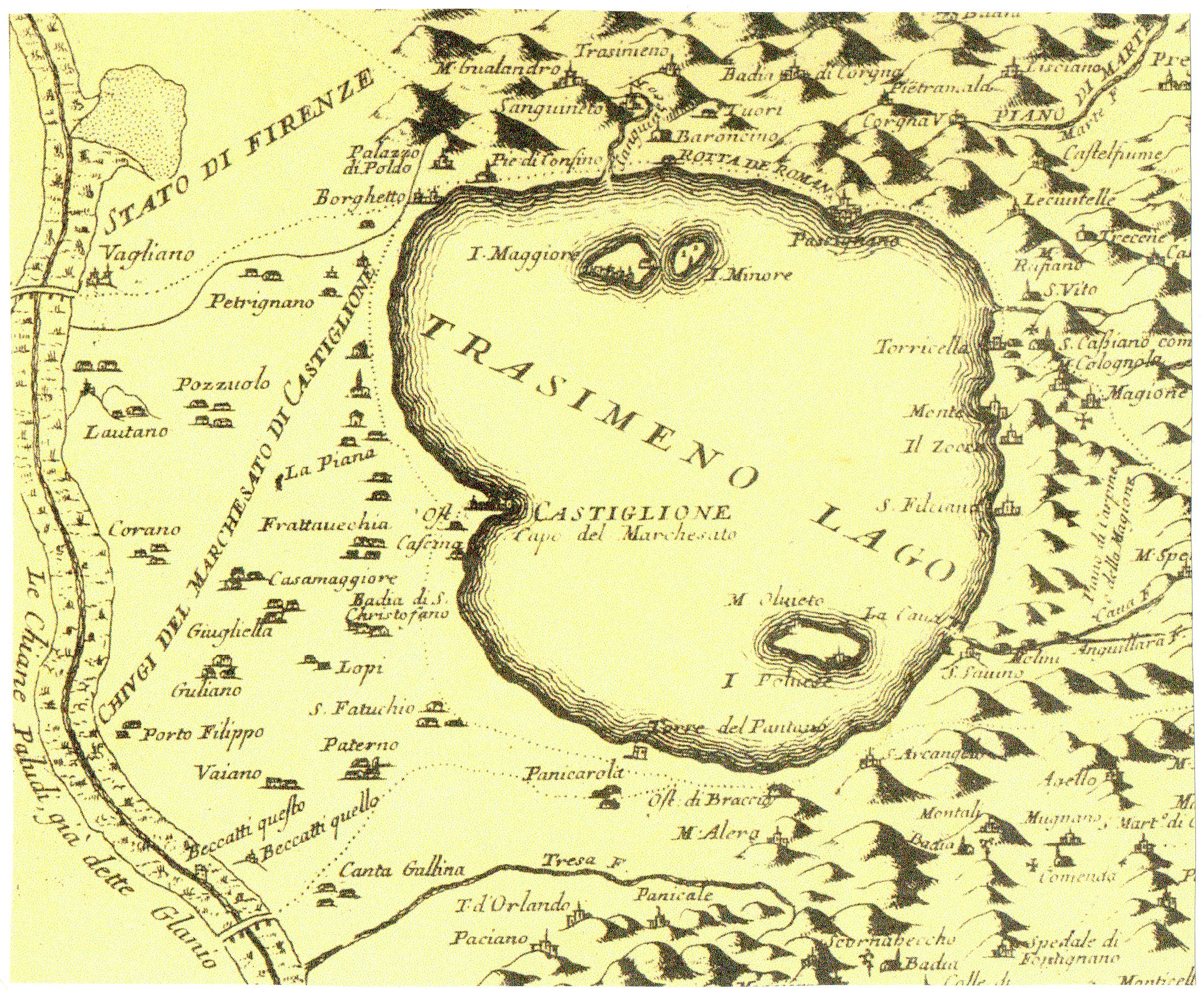 Scannerizzazione carta del marchesato di Castiglione del Lago - primi anni del 1600